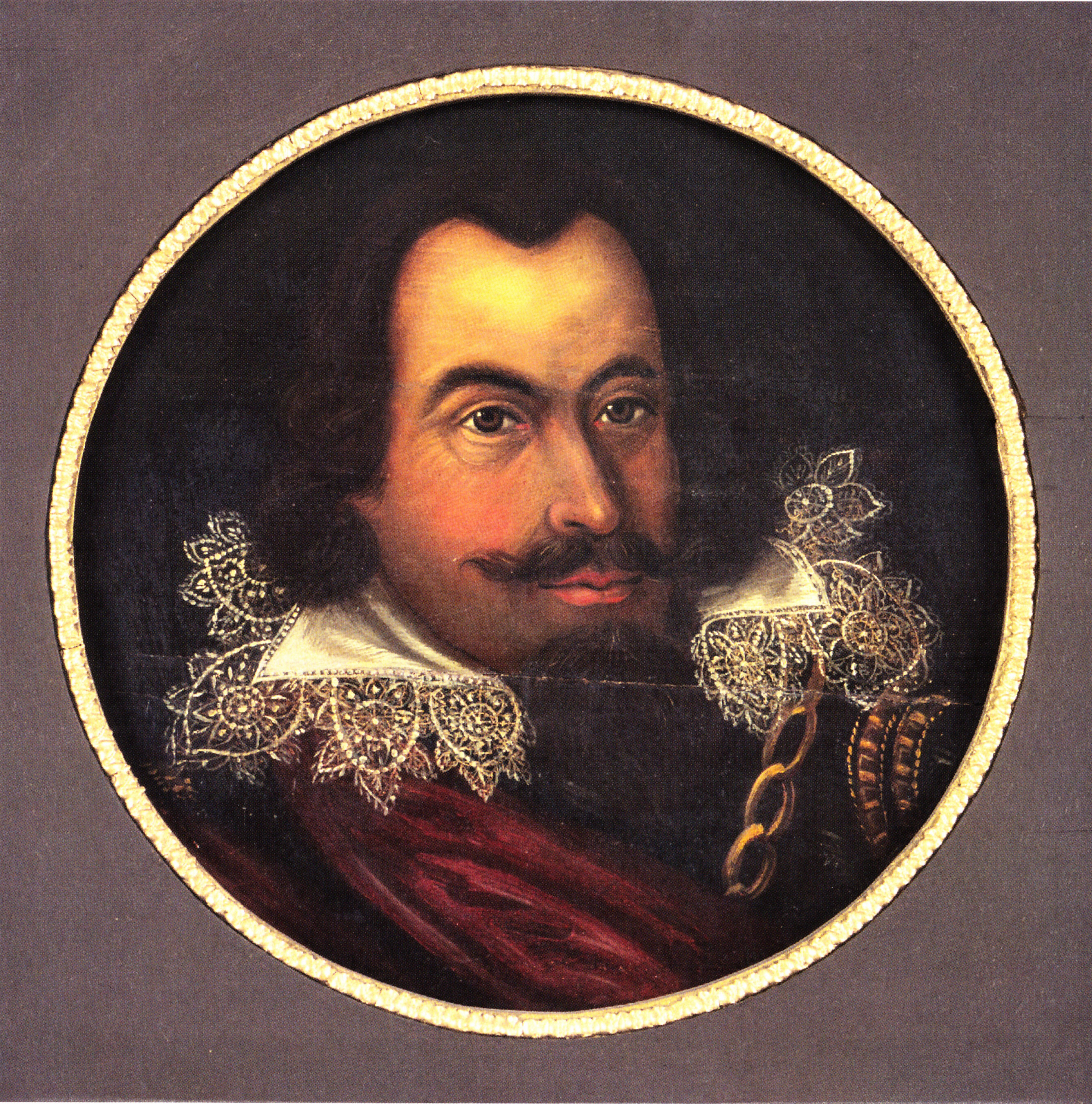 Ölgemälde von Herzog Franz von Pommern, früher in der Börse Stettin